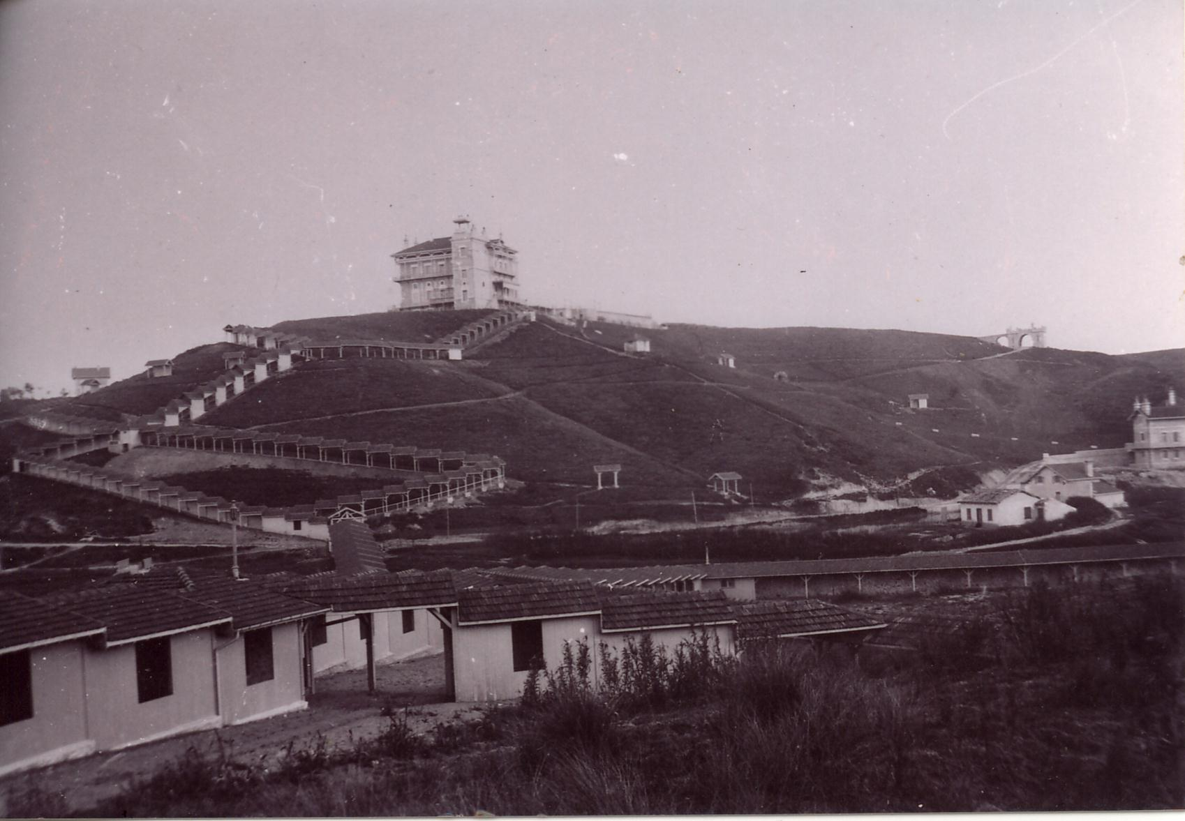 Le château d'Ilbarritz est situé à Bidart (Pyrénées-Atlantiques) en 1898 (agence Benquet).